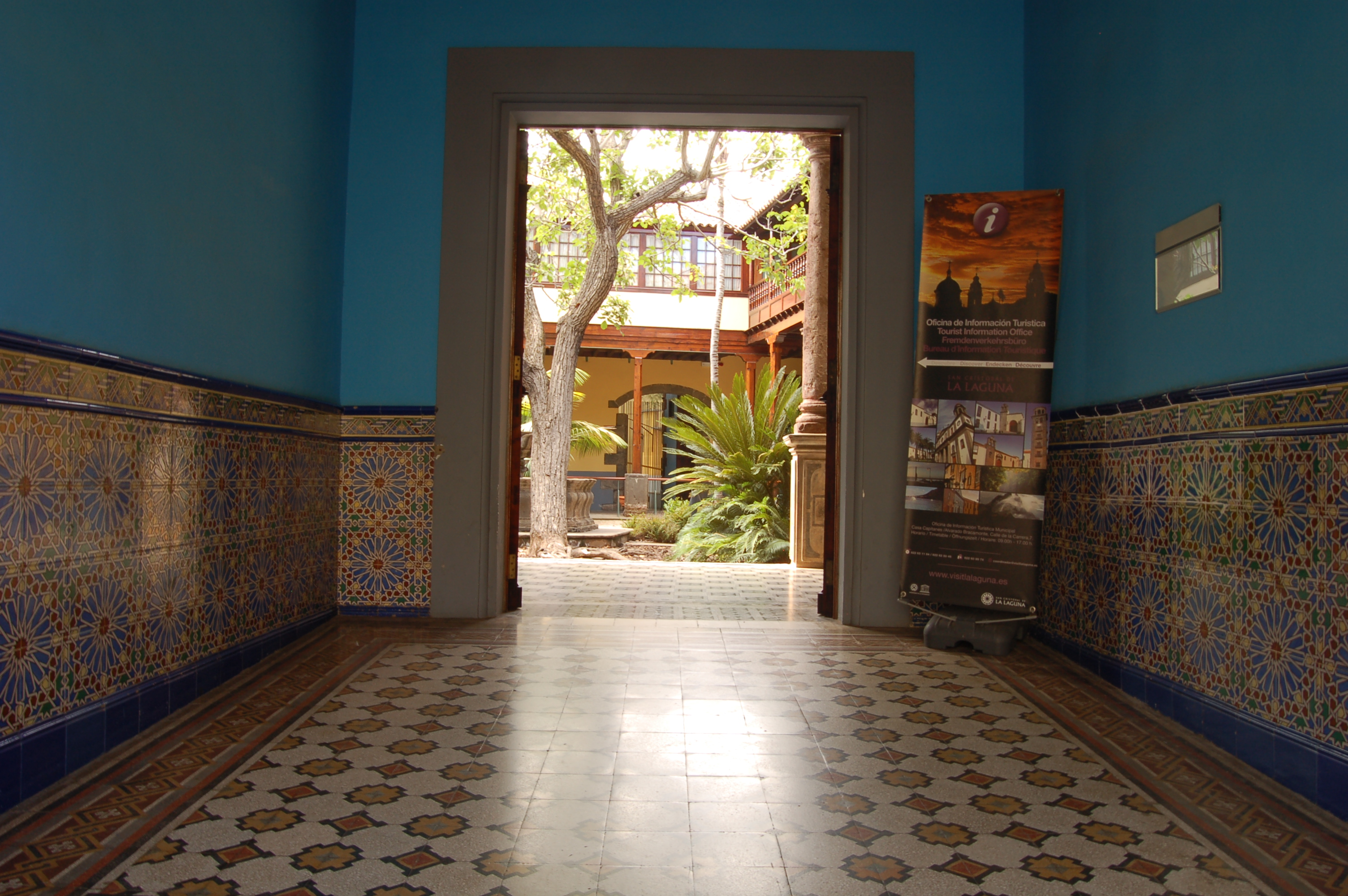 Recibidor